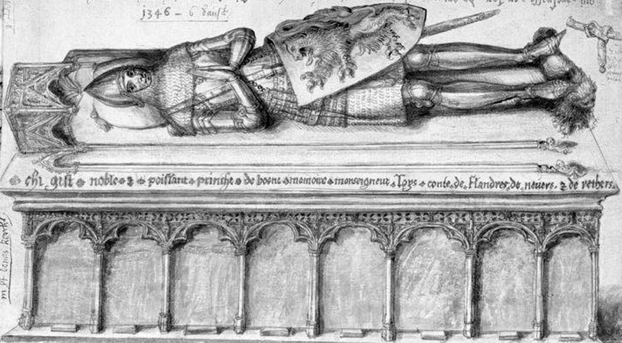 Náhrobek Ludvíka Flanderského v katedrále sv. Donáta v Bruggách